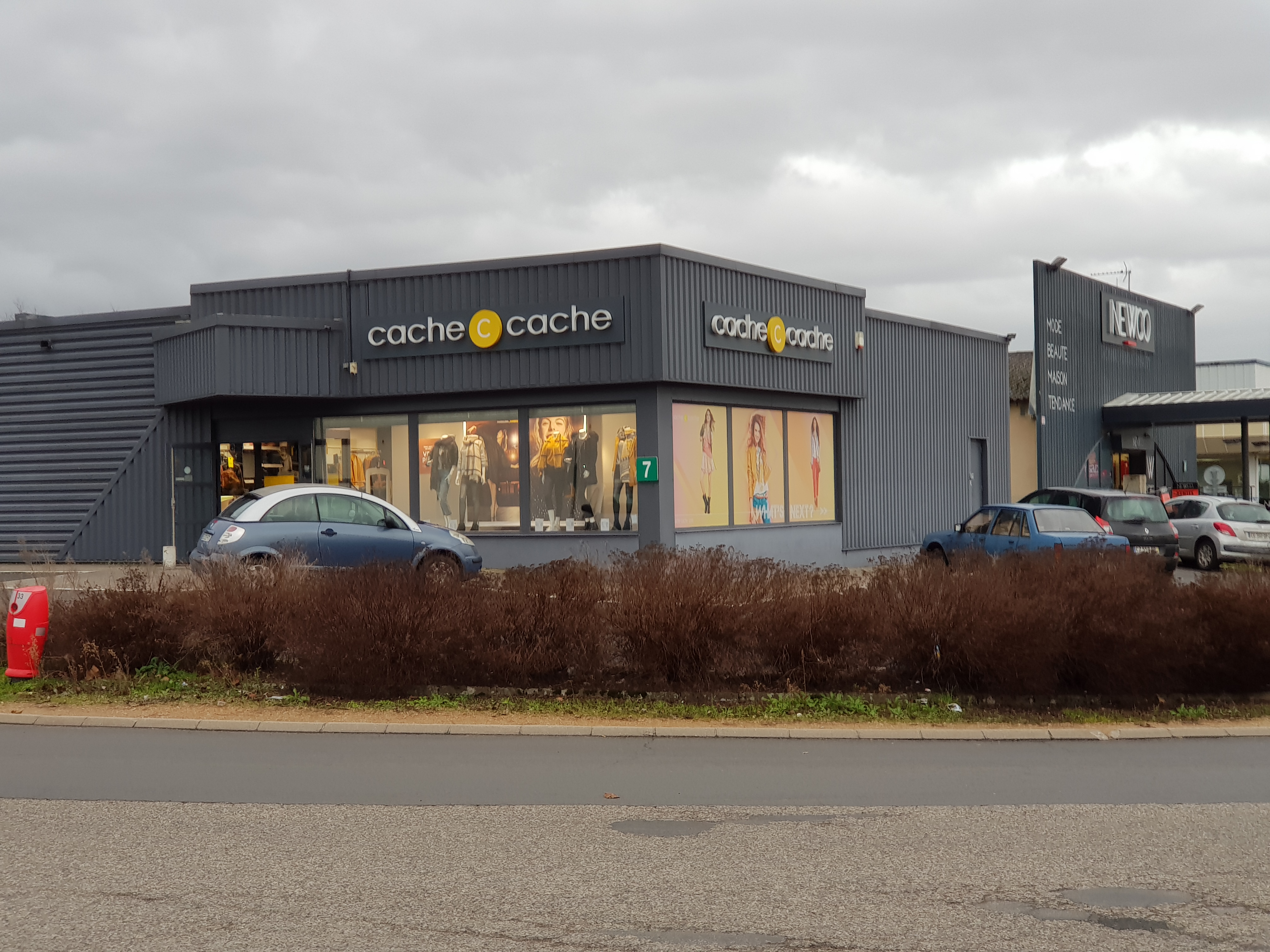 Le magasin Cache-Cache de Thiers